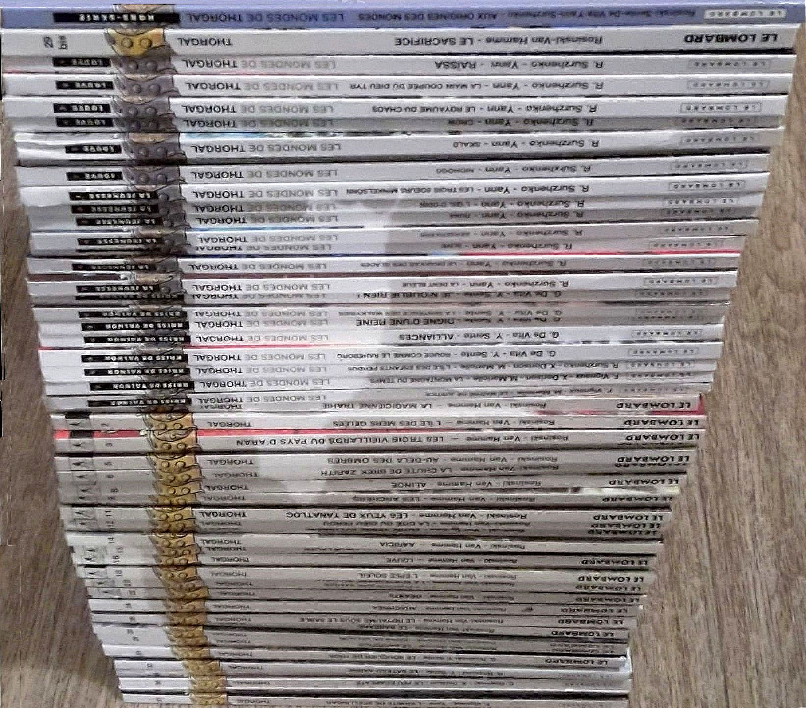 Collection Thorgal.